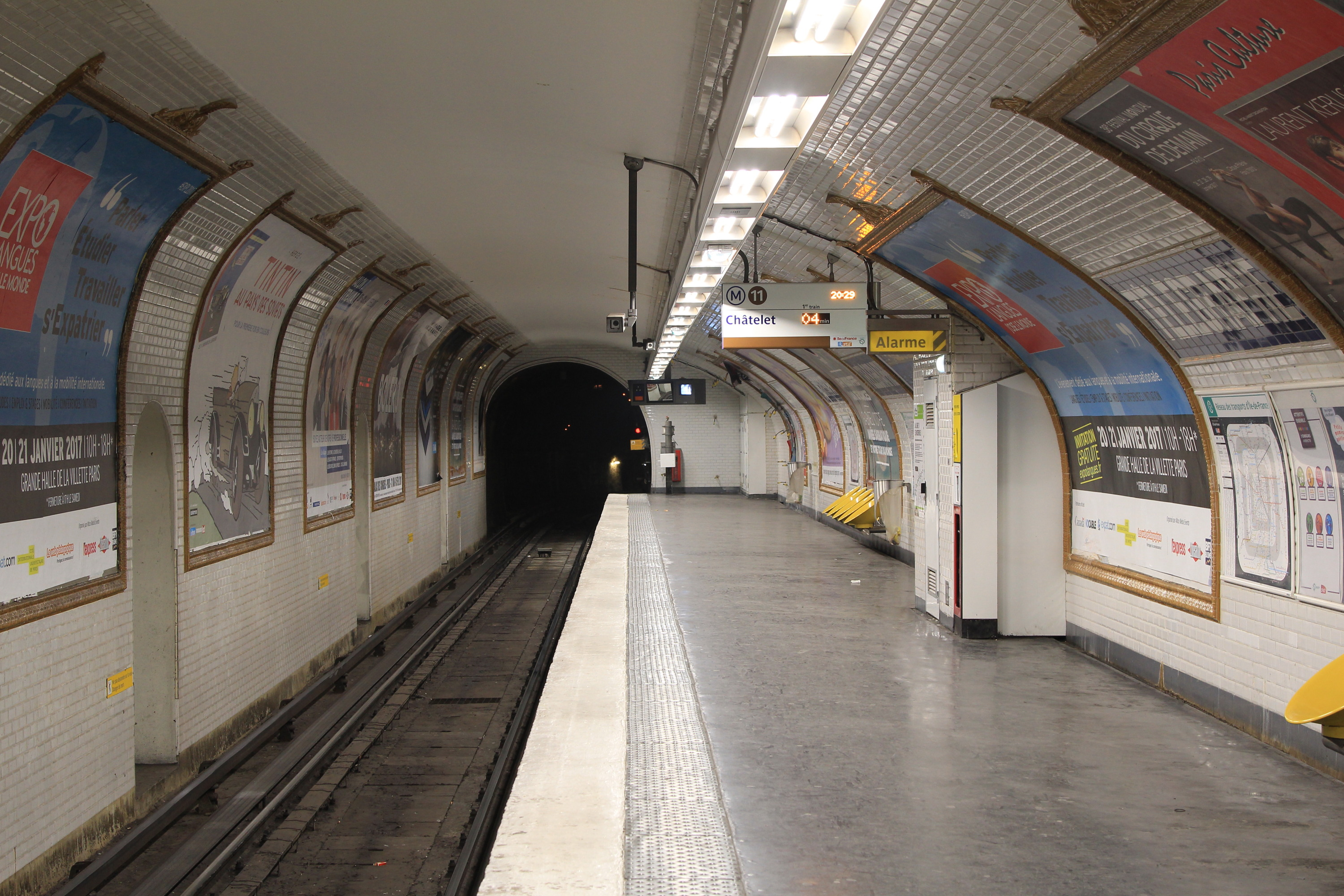 Quai en direction de Châtelet de la station Télégraphe du métro de Paris.